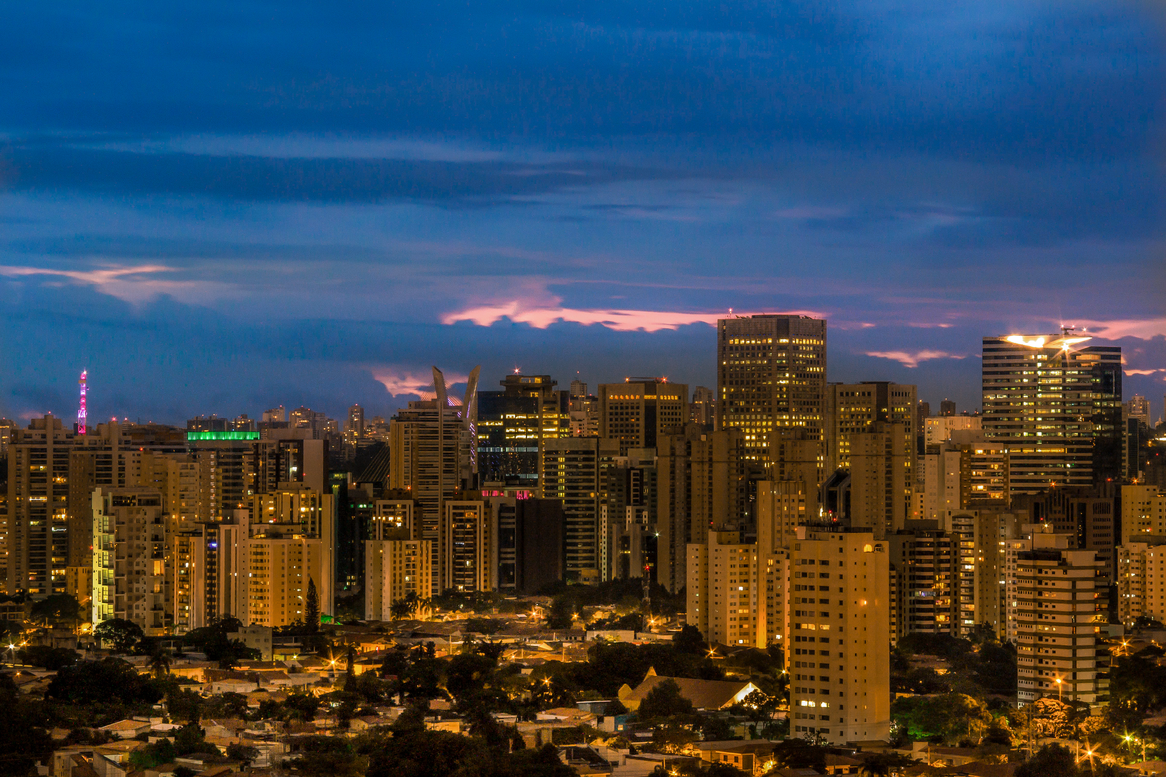 São Paulo à noite, Brasil.